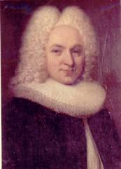 Johann Baptista Mutzenbecher (1691-1759)